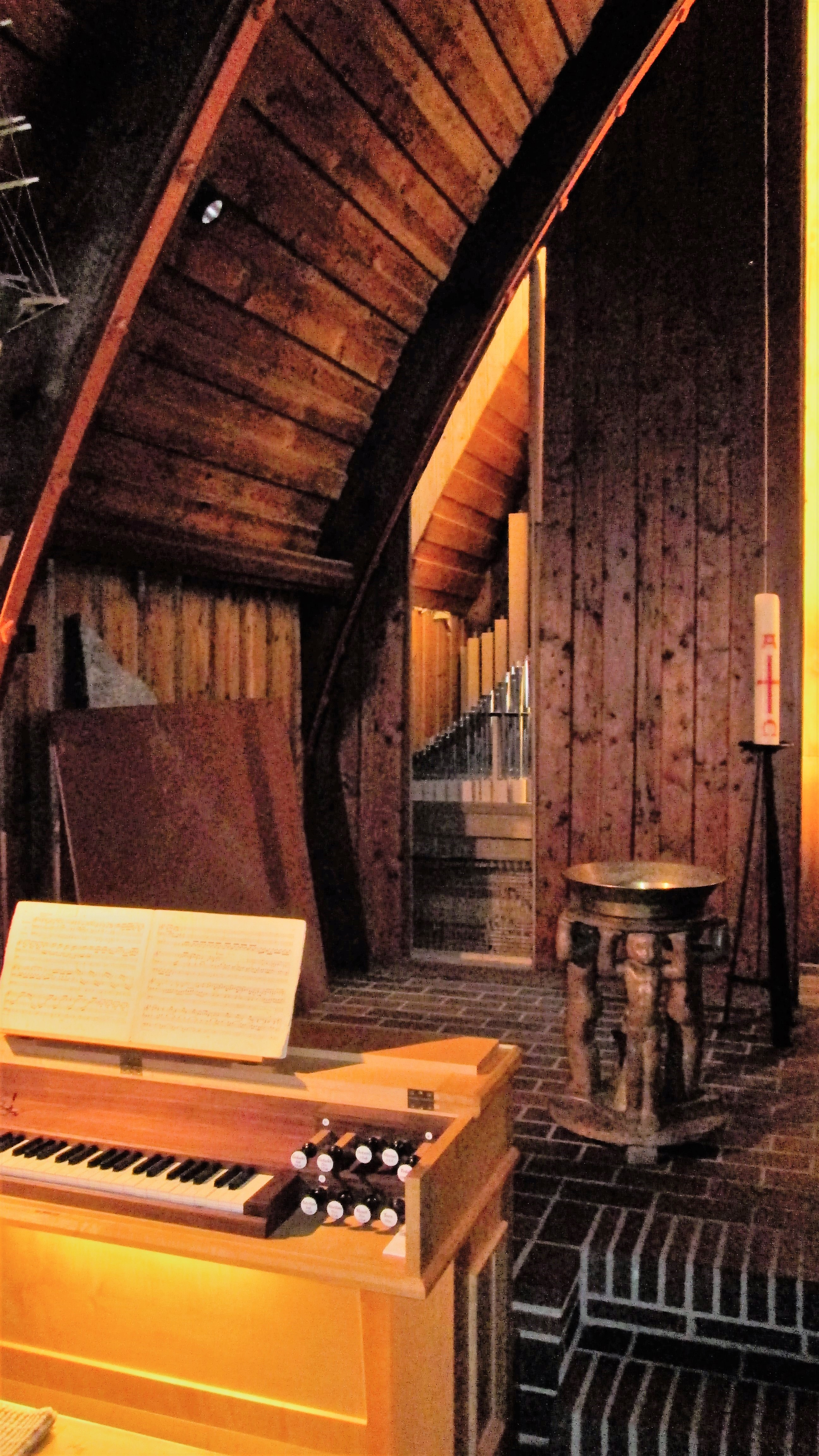 Orgel der Orgelwerkstatt Wegscheider in der Schifferkirche Ahrenshoop (Kreis Vorpommern-Rügen): Spieltisch und geöffnetes Pfeifenwerk